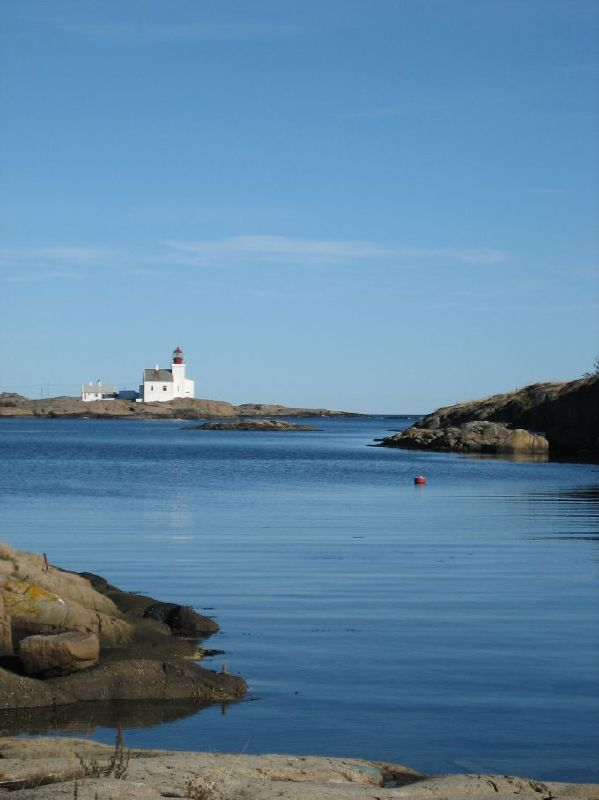 Lyngør fyr